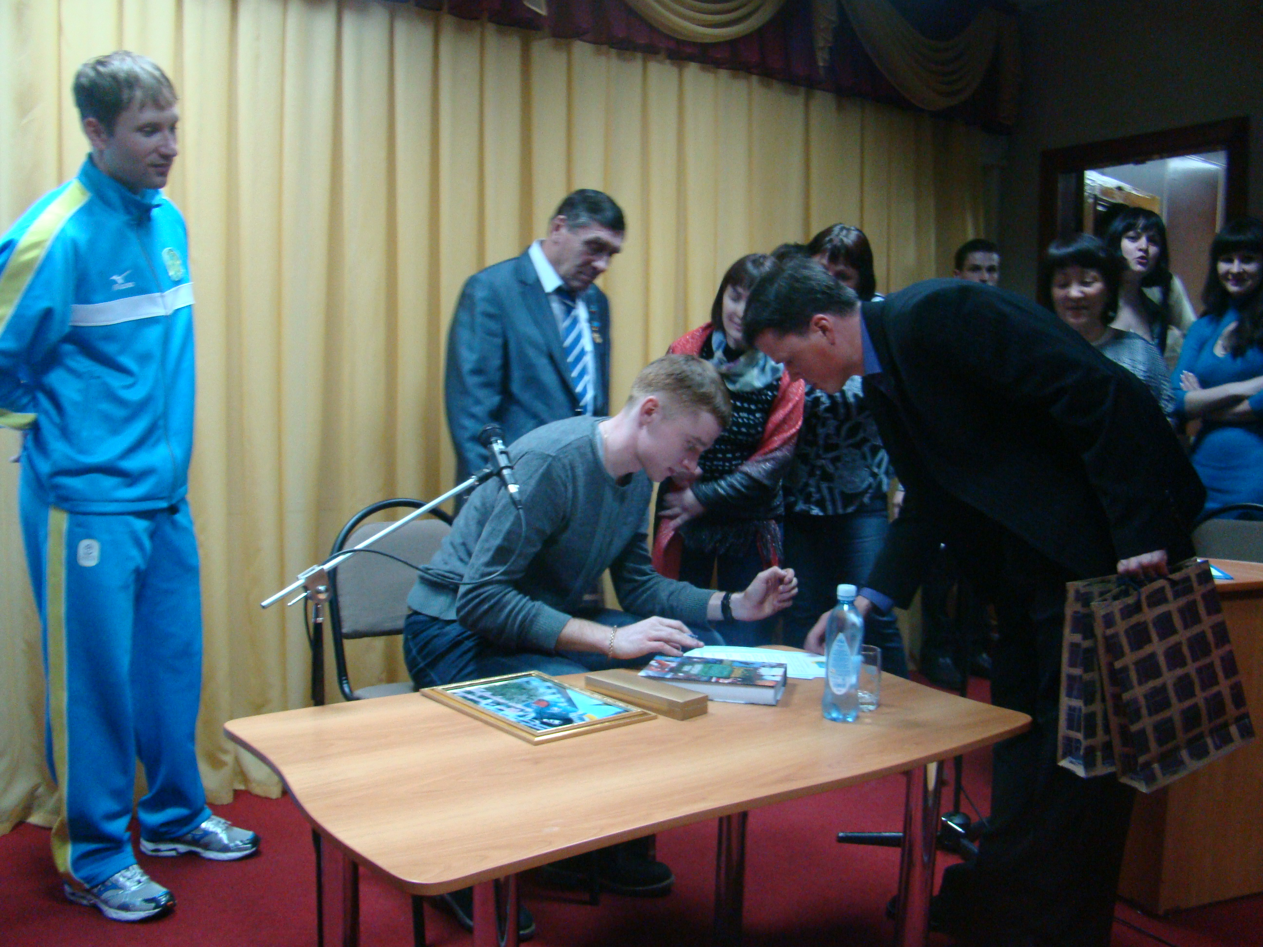 Отдел выставочно-массовой работы (Костанайская областная универсальная научная библиотека им. Л. Н. Толстого)